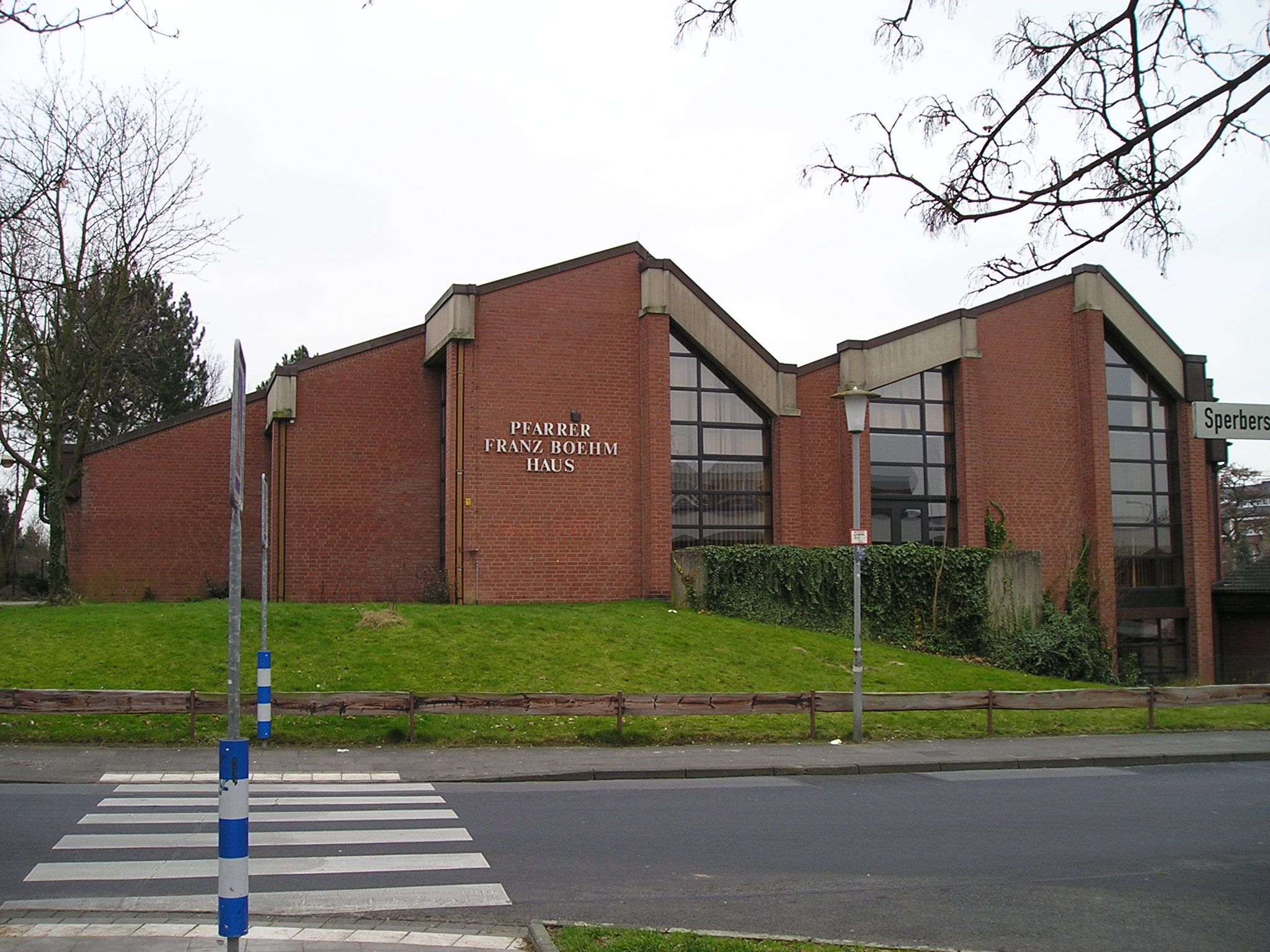 Pfarren-Franz-Böhm-Haus der katholischen Kirche, Monheim am Rhein